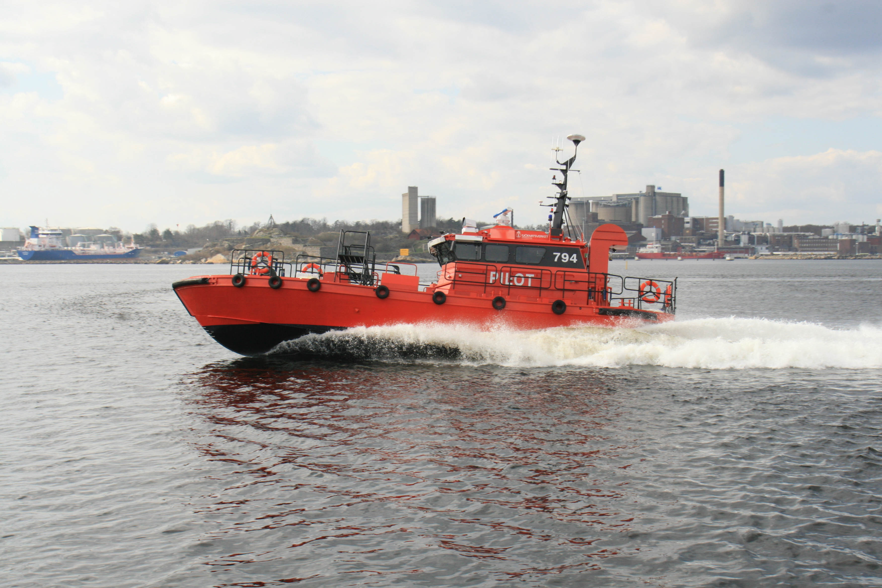 Lotsbåten Pilot 794 SE vid Ortholmen, Karlshamn